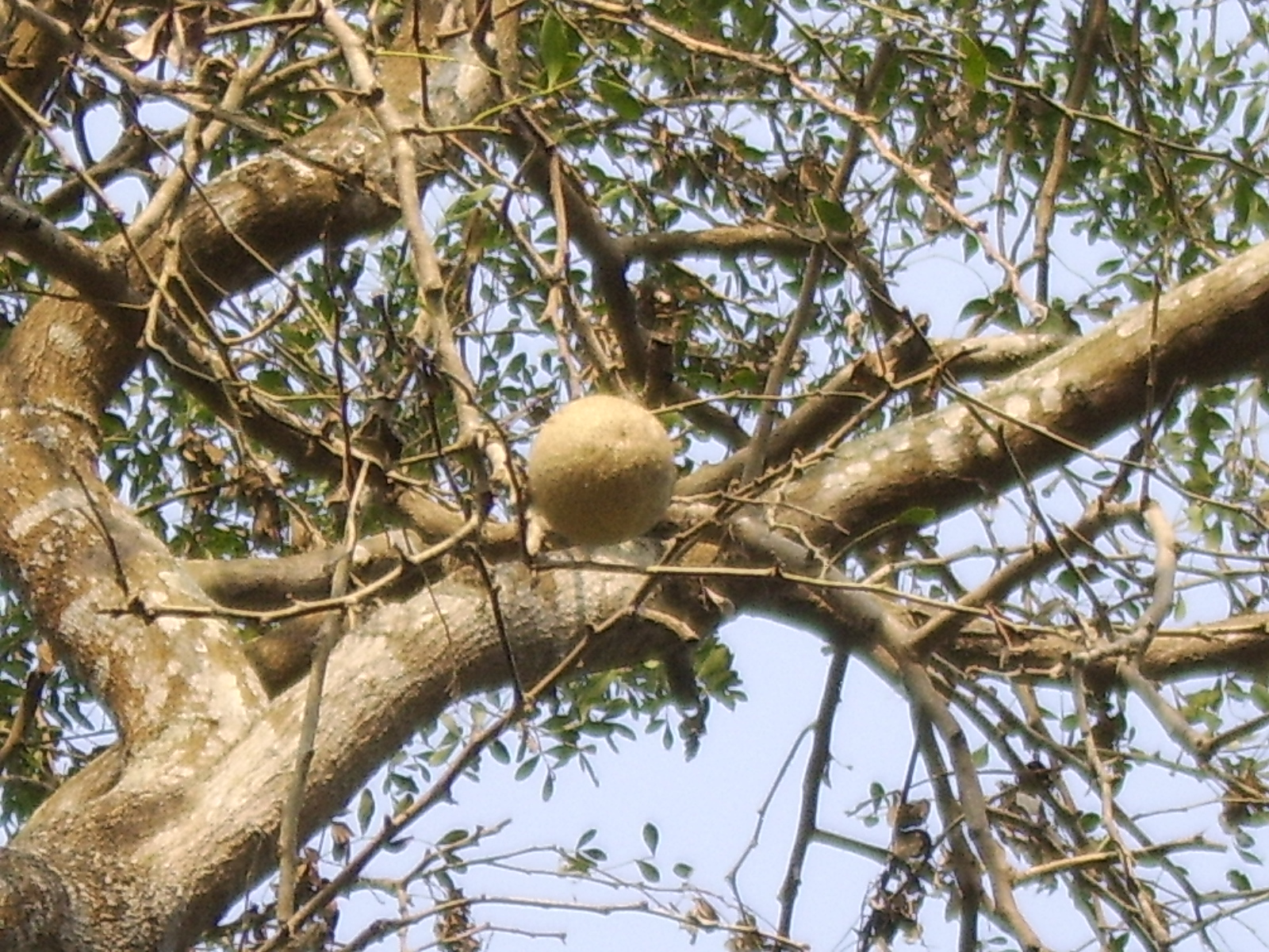 Kot Bel